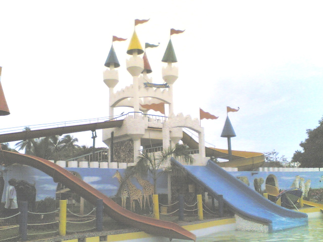 Kunduchi Beach Hotel in Dar es Salaam, Tanzania